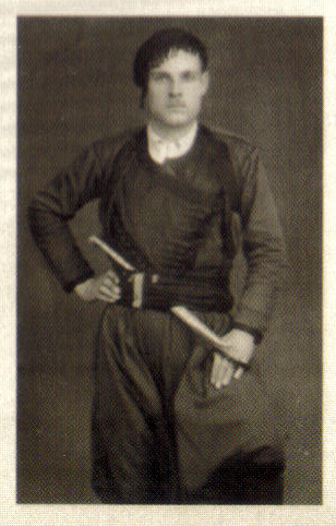 ΠΕΡΑΚΑΚΗΣ ΝΙΚΟΣ ΦΟΙΤΗΤΗΣ ΠΑ 1940 ΥΠΟΔΥΌΜΕΝΟΣ ΤΟΝ ΚΩΣΤΗ ΓΙΑΜΠΟΥΔΑΚΗ